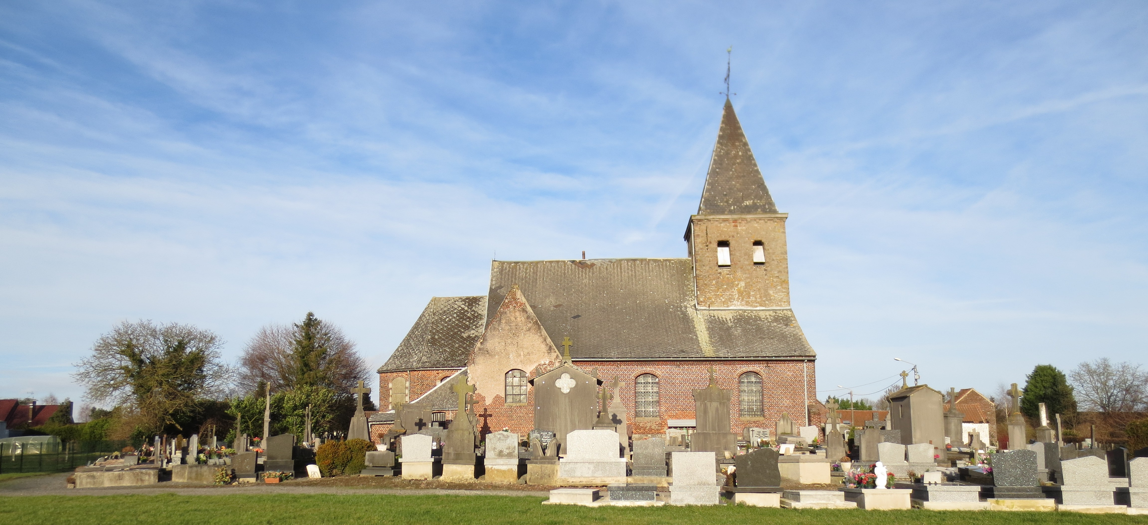 Vue de l'église.